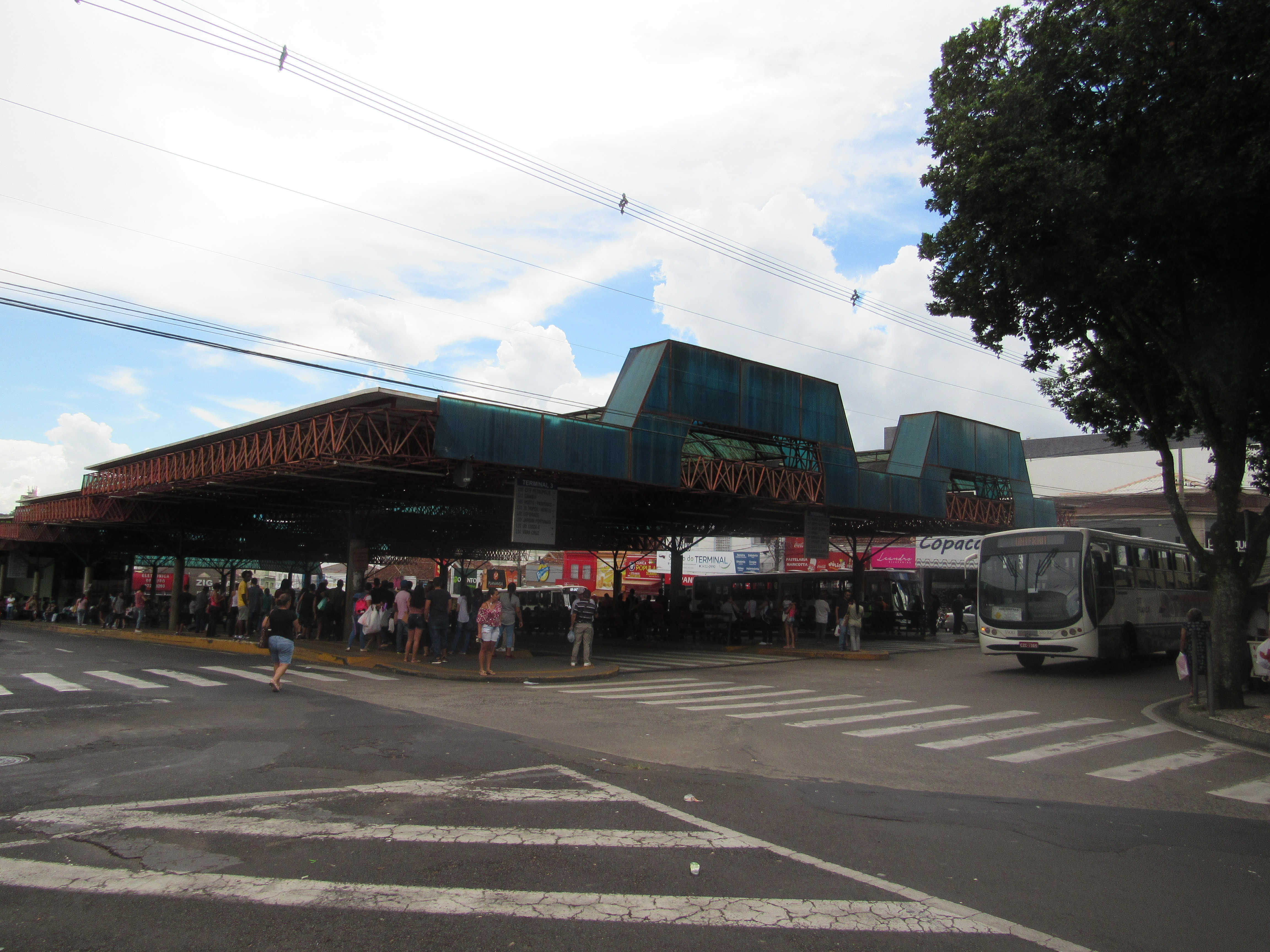 Terminal de ônibus urbano "Ayrton Senna", Franca (SP), Brasil